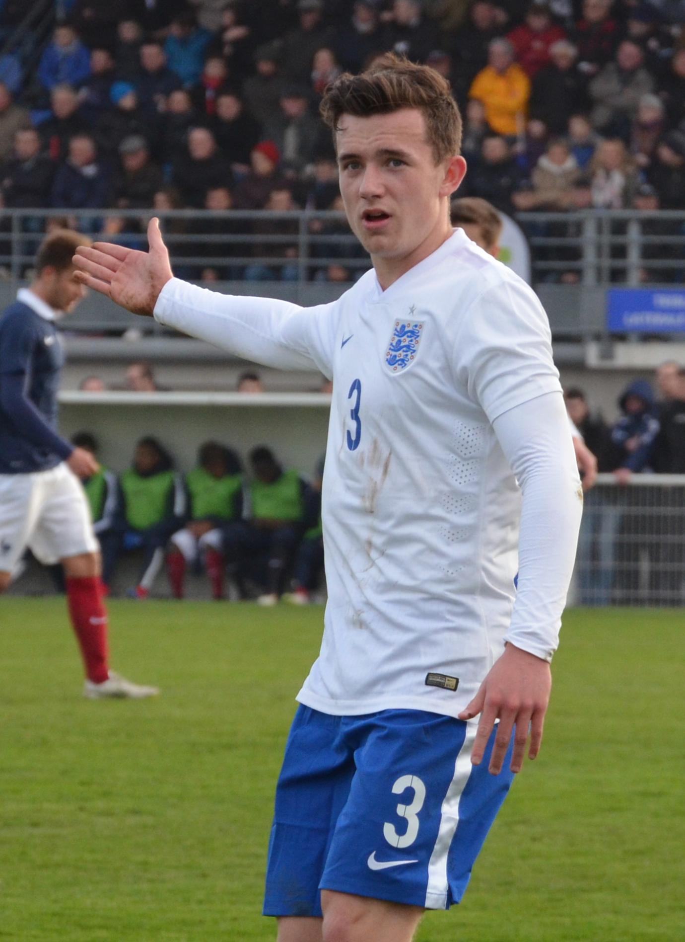 Photographie prise lors du match opposant la France à l'Angleterre pour les qualifications du championnat d'Europe de football des moins de 19 ans 2015 au stade Louis-Villemer de Saint-Lô le 31 mars 2015. Ici, Ben Chilwell.